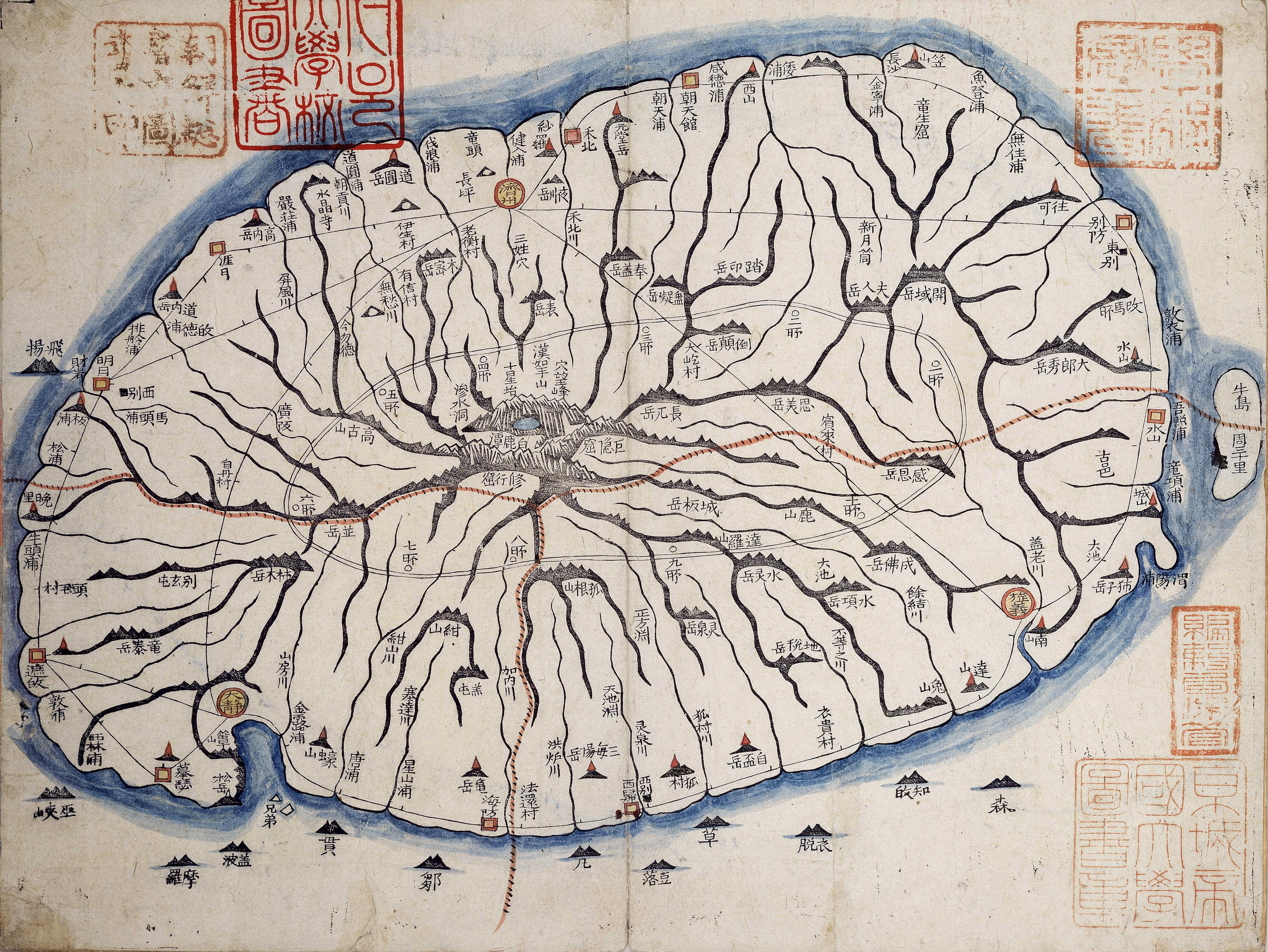 대동여지도